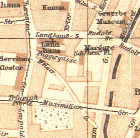 Stadtplan Innsbruck (ca. 1910)